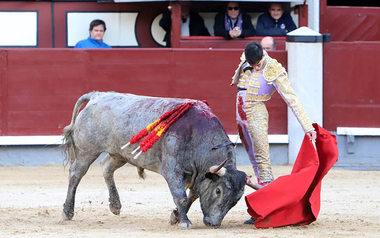 Fotografía donde se puede apreciar al torero Saúl Jiménez Fortes realizando un natural en el transcurso de una de sus faenas. El toro en cuestión se llama "Mucamo".